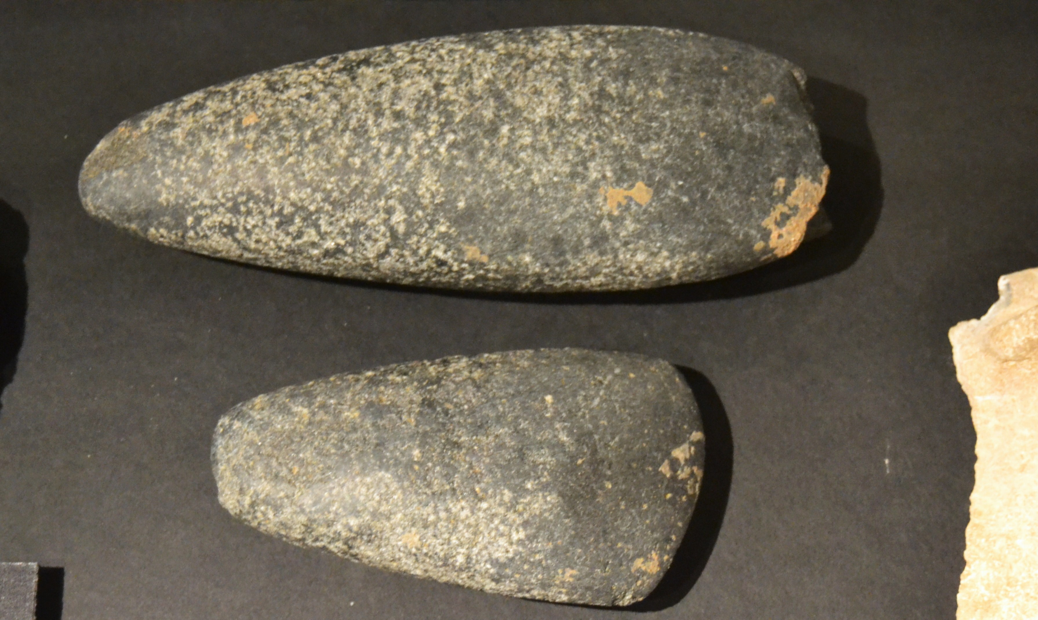 Destrals de pedra polida, calcolítíc, mitjans del III mil·leni aC. Cova del barranc de Migdia, museu Soler Blasco.